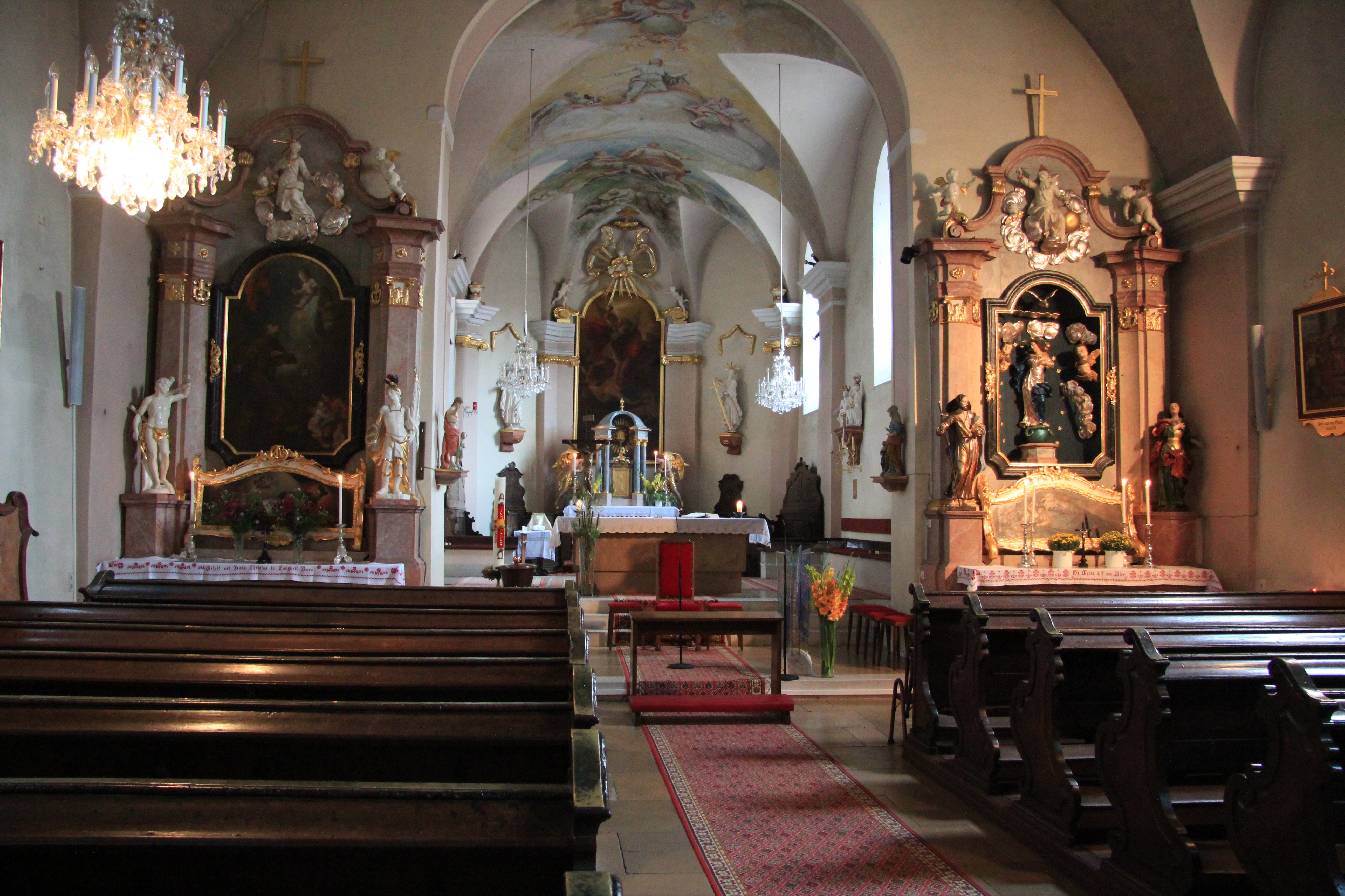 Kath. Pfarrkirche hl. Michael in Orth an der Donau